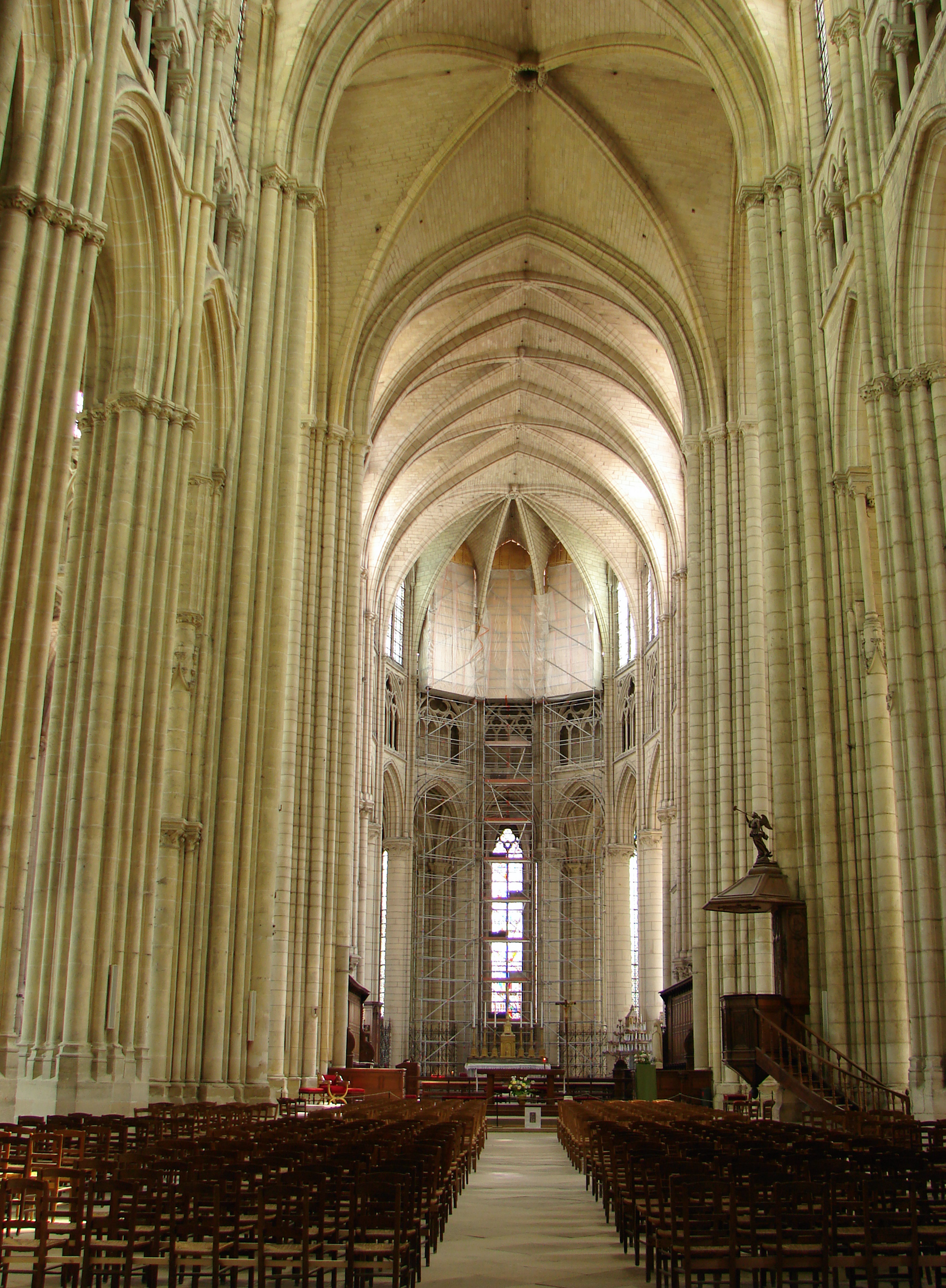 La nef et le choeur de la cathédrale Saint-Etienne de Meaux.